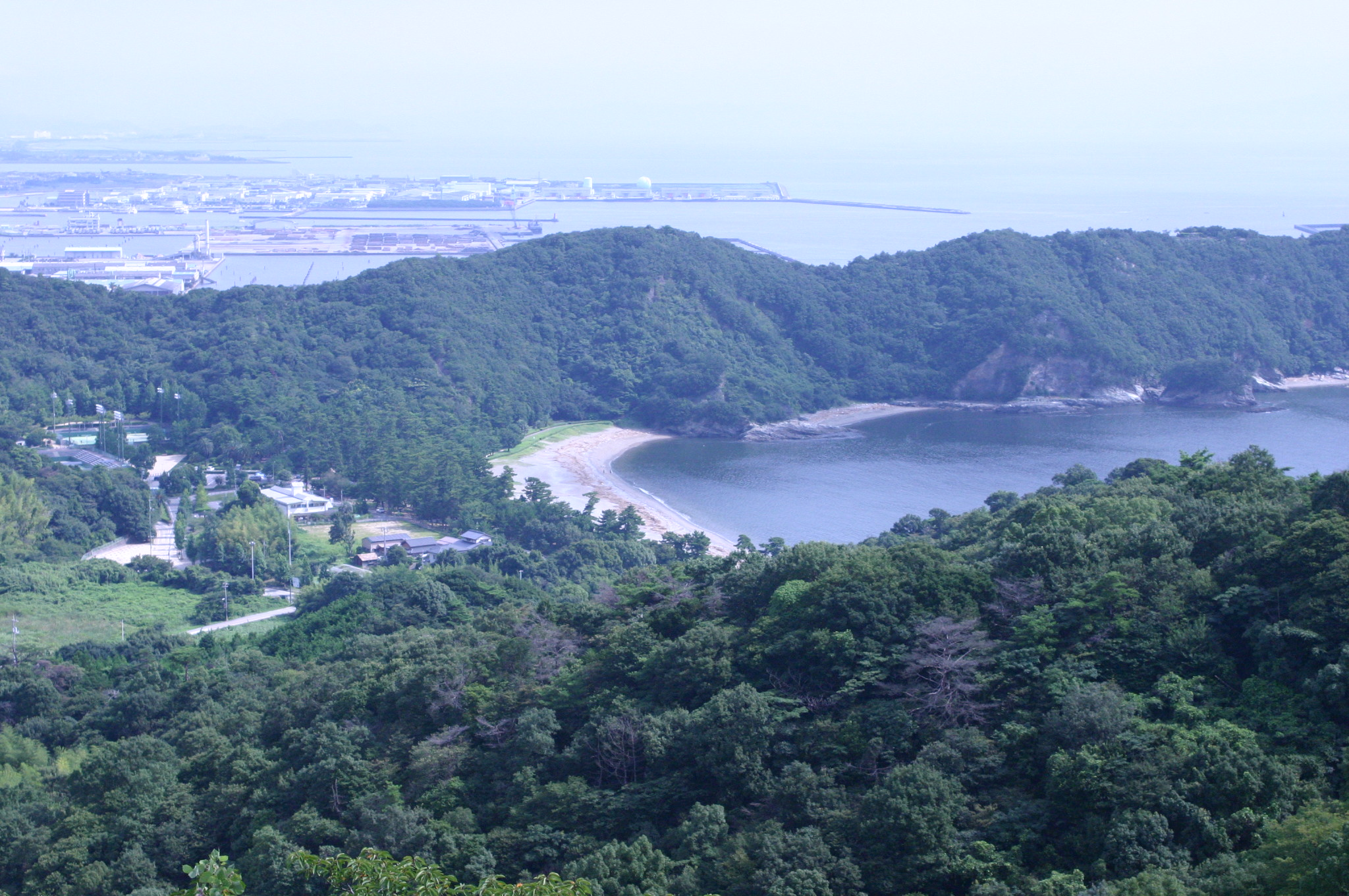 日の峰山から撮影した大神子海岸遠景